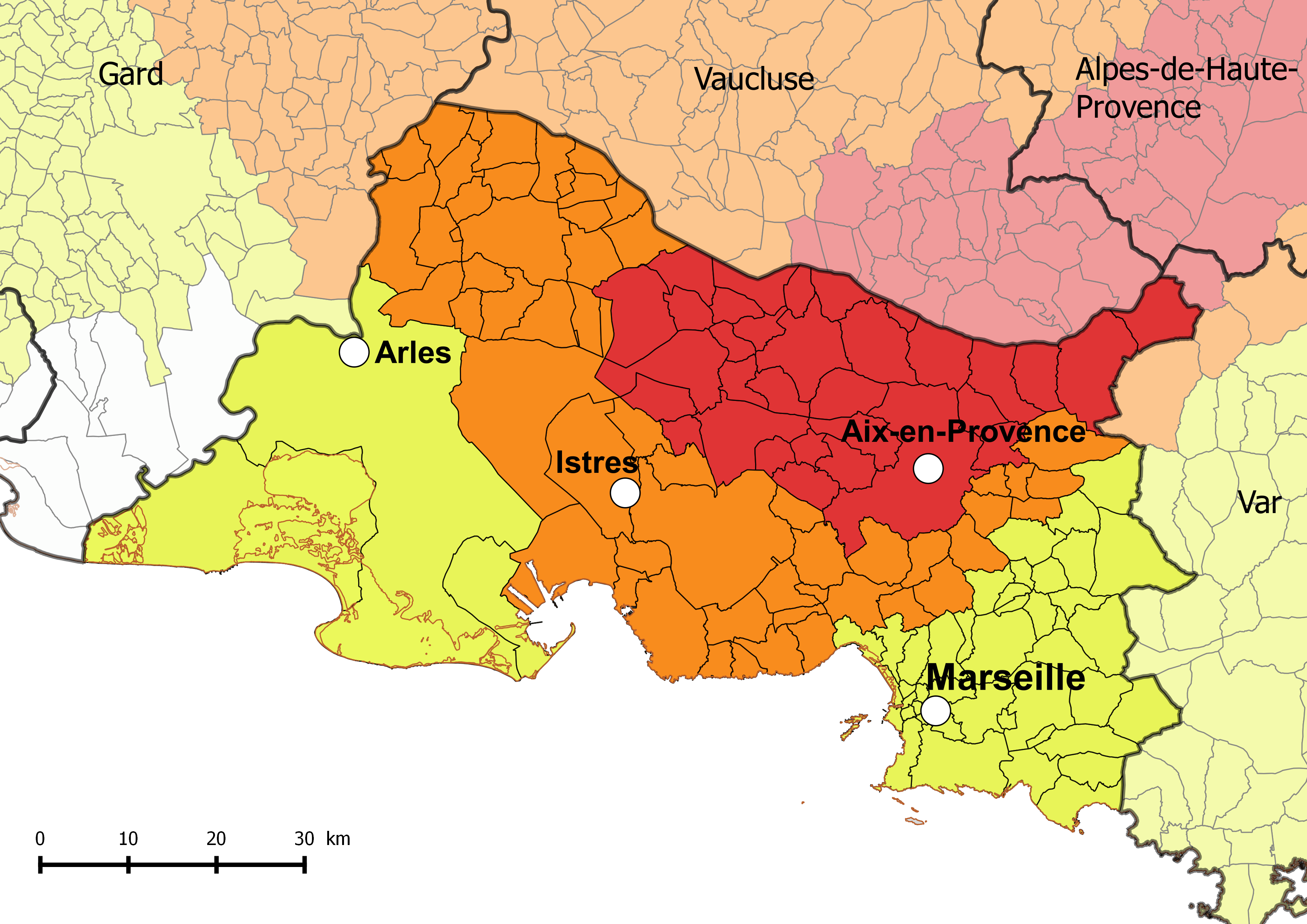 Carte du zonage sismique du département français des Bouches-du-Rhône.